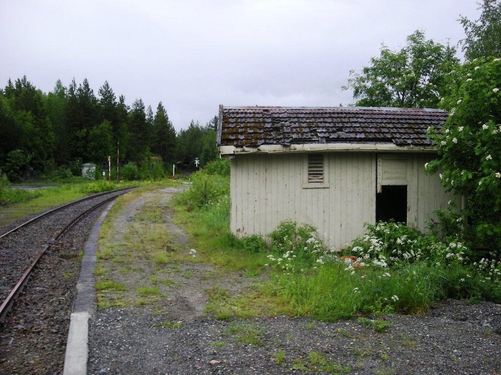 Fall stasjon på Valdresbanen